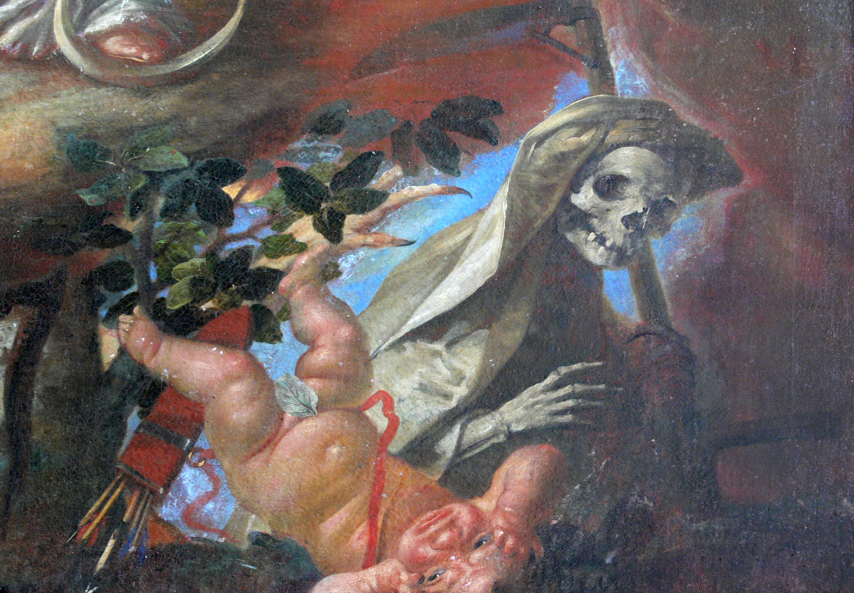 Wallfahrtskirche Maria zum Berge Karmel, Baitenhausen, Stadt Meersburg, Bodenseekreis Gemälde "Immaculata", um 1705–1715, Johann Michael Feichtmayrr d. Ä. zugeschrieben; Detail: Cupido stürzt in die Tiefe, der Tod wendet sich ab